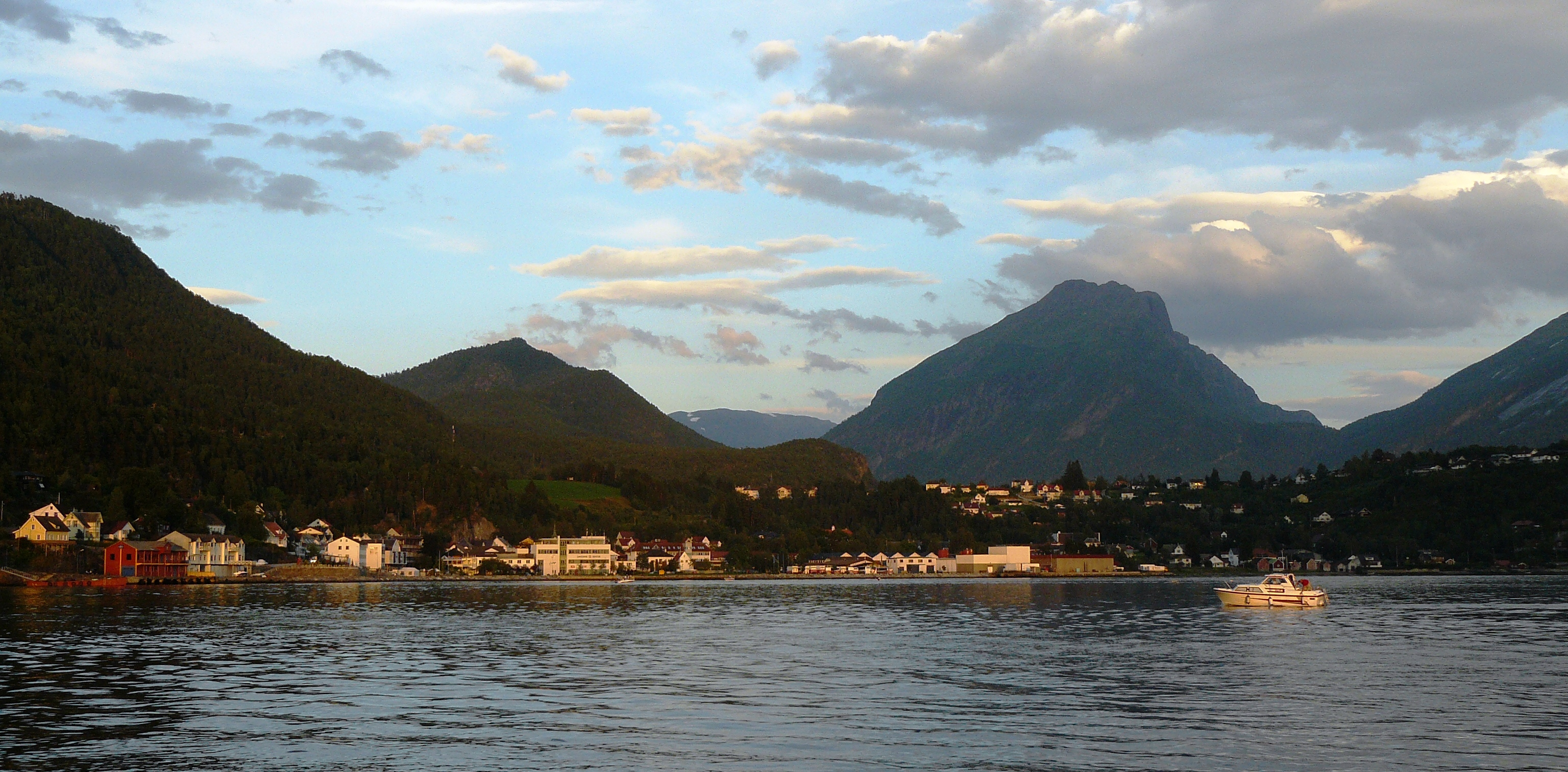 Sandane - fjordview